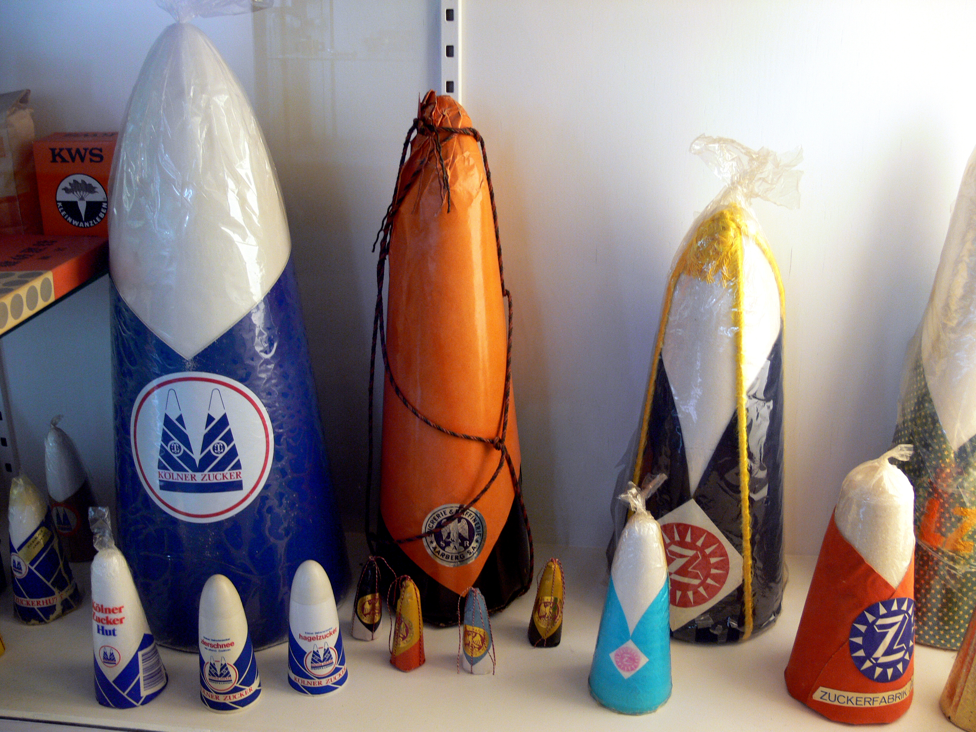 Zuckerhüte, Zucker-Museum Berlin